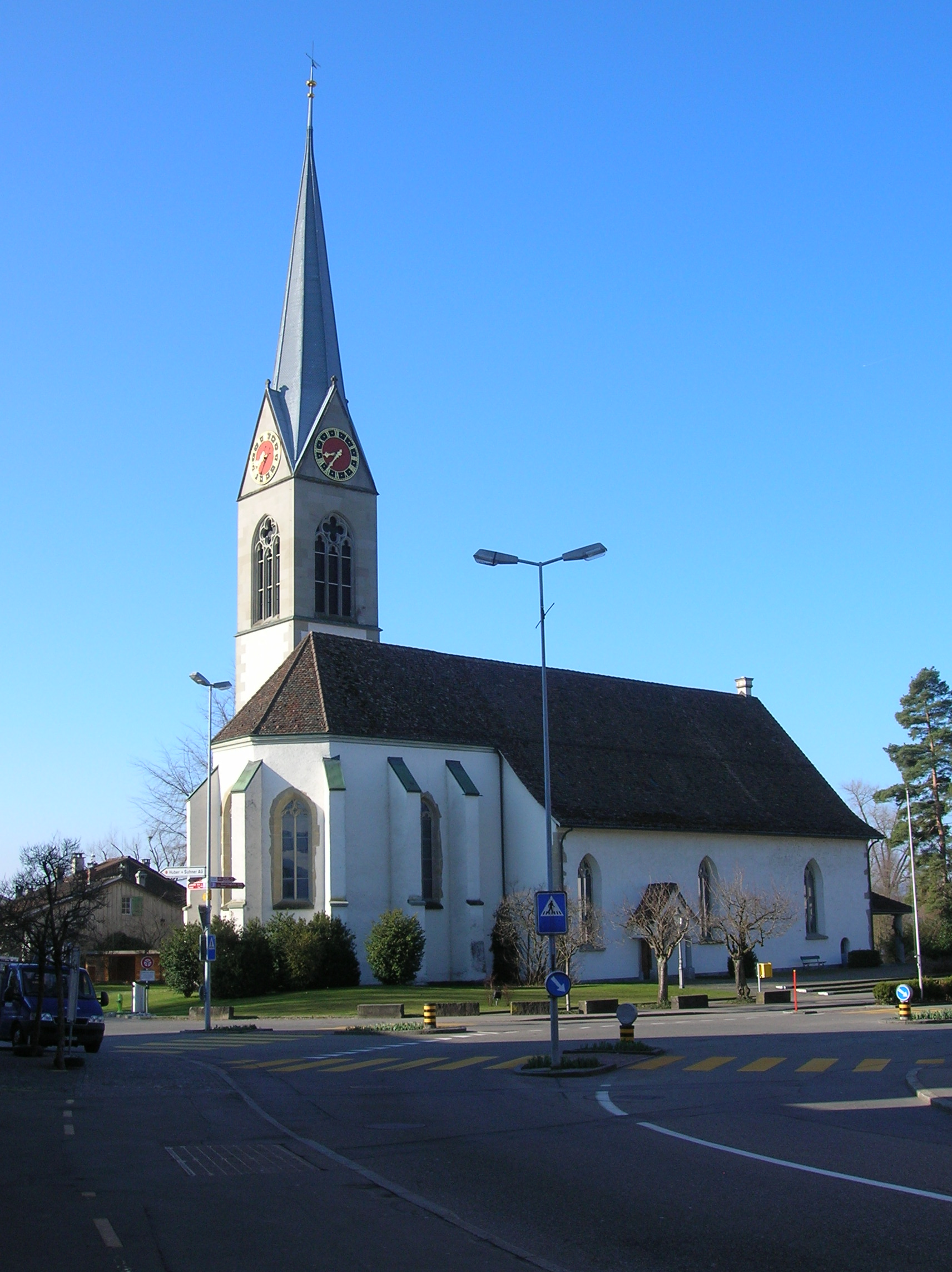 Pfäffike ZH, Chille